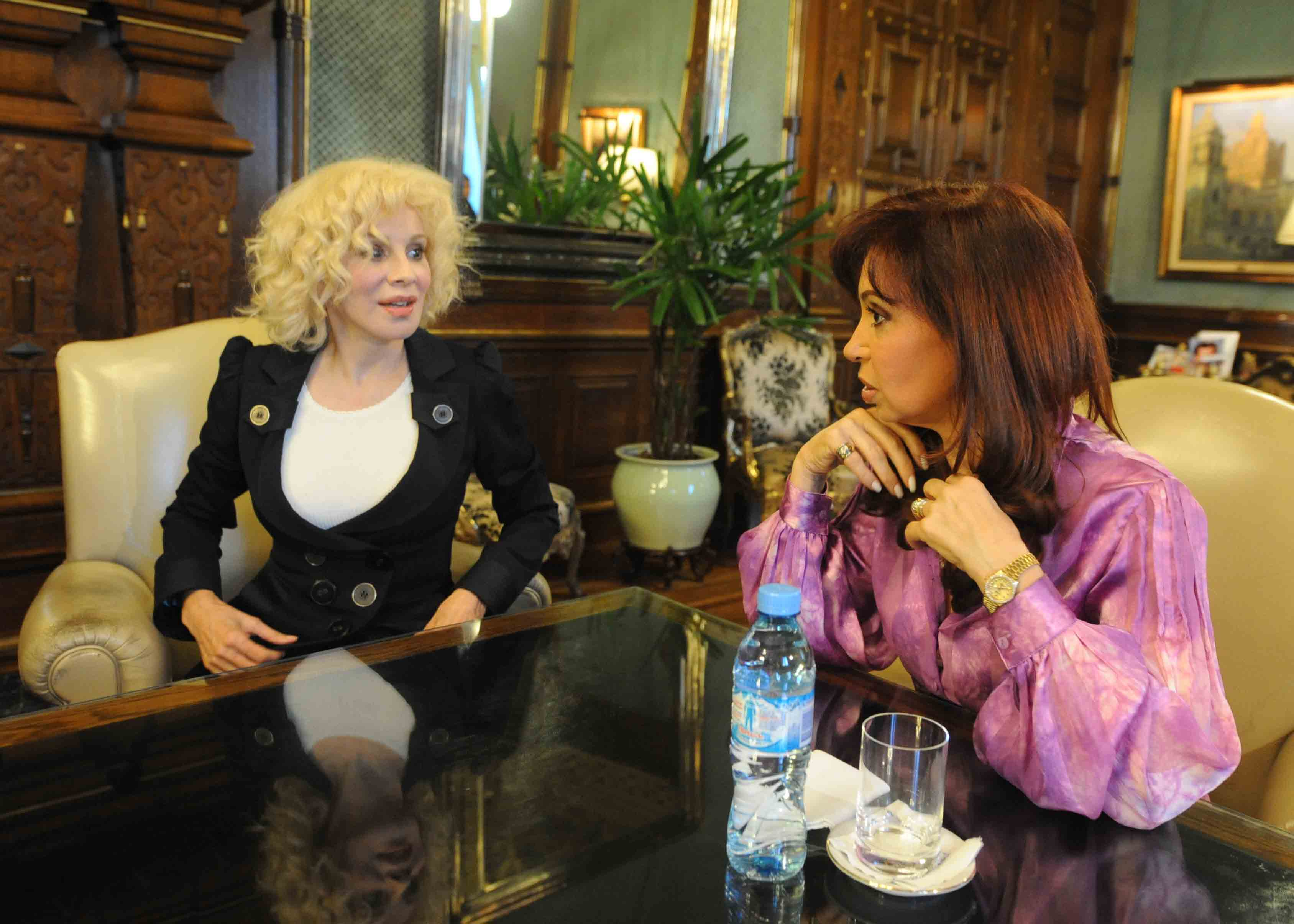 La actriz Nacha Guevara reunida con la presidenta Cristina Fernández, en el Despacho Presidencial de Casa de Gobierno.